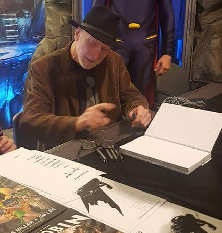 Frank Miller durante il suo firmacopie a Lucca Comics and Games 2016